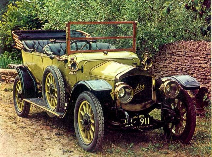 Ein Excelsior aus dem Jahr 1911.